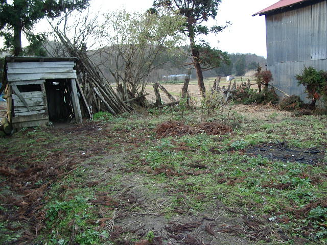 大平山本I遺跡 Ōdaiyama Ichi Iseki, Sotogahama, Aomori, Japan